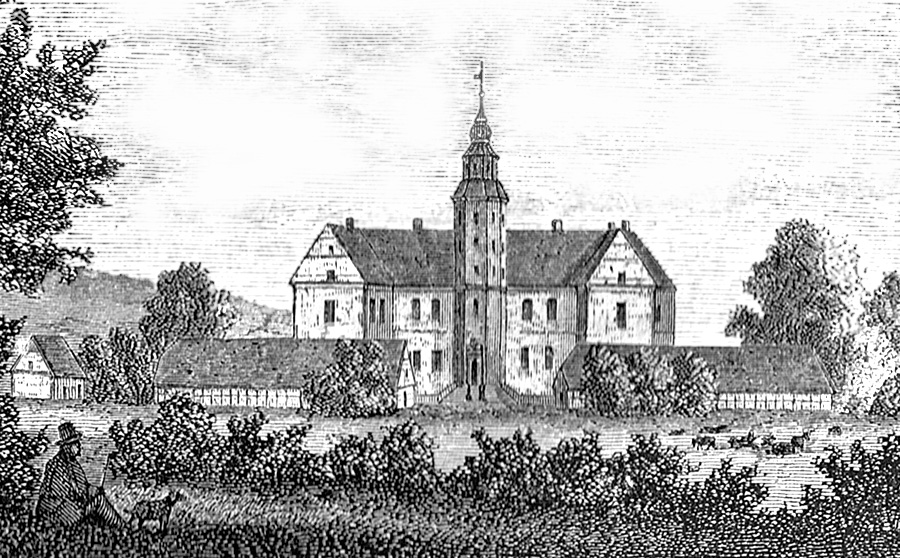 Nørlund slot (Ravnkilde Sogn, Års Herred) var i 1300-tallet blot et tårn, der blev kaldt "en røverhule", og som Valdemar Atterdag lod nedrive i 1355. Borgen blev genopbygget og dannede fortsat udgangspunkt for udplyndring af rejsende mellem Randers og Aalborg. I slutningen af 1300-tallet gav dronning Margrete 1. ordre til at nedrive borgen. Ludvig Munk arvede Nørlund i 1570, og han begyndte i 1581 at opføre Nørlund slot. Slottet stod færdigbygget i 1597